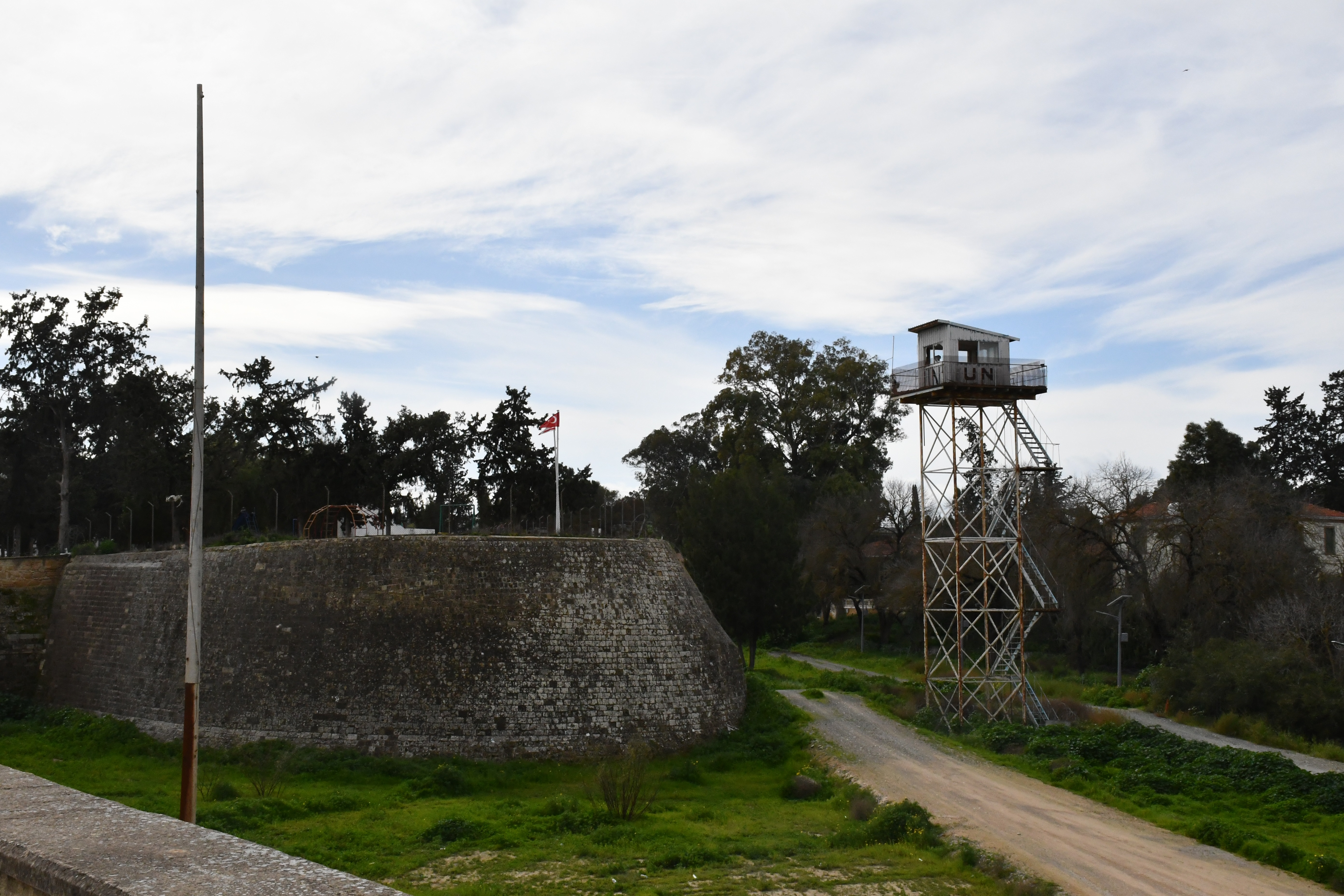 Yiğitler Burcu'nun Birleşmiş Milletler kontrolündeki ara bölgeye bakan cephesi